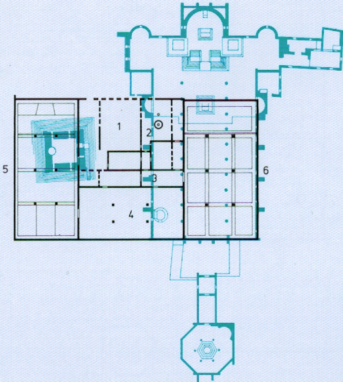 Aquileia basilica - closeup of superposition of eldest Theodorian halls and current Basilica.